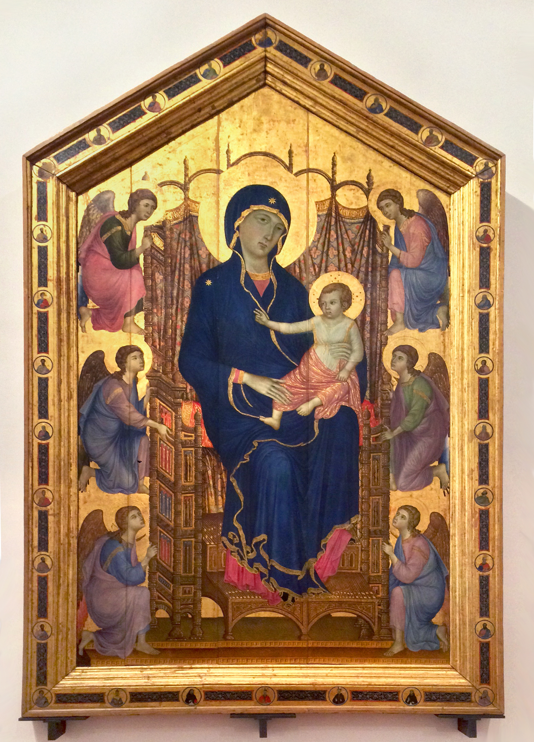 Madonna em Majestade dita Rucellai